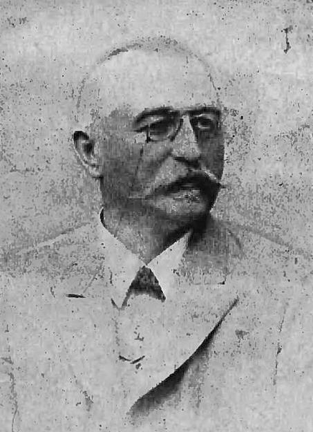 Paweł Stwiertnia (-1907)